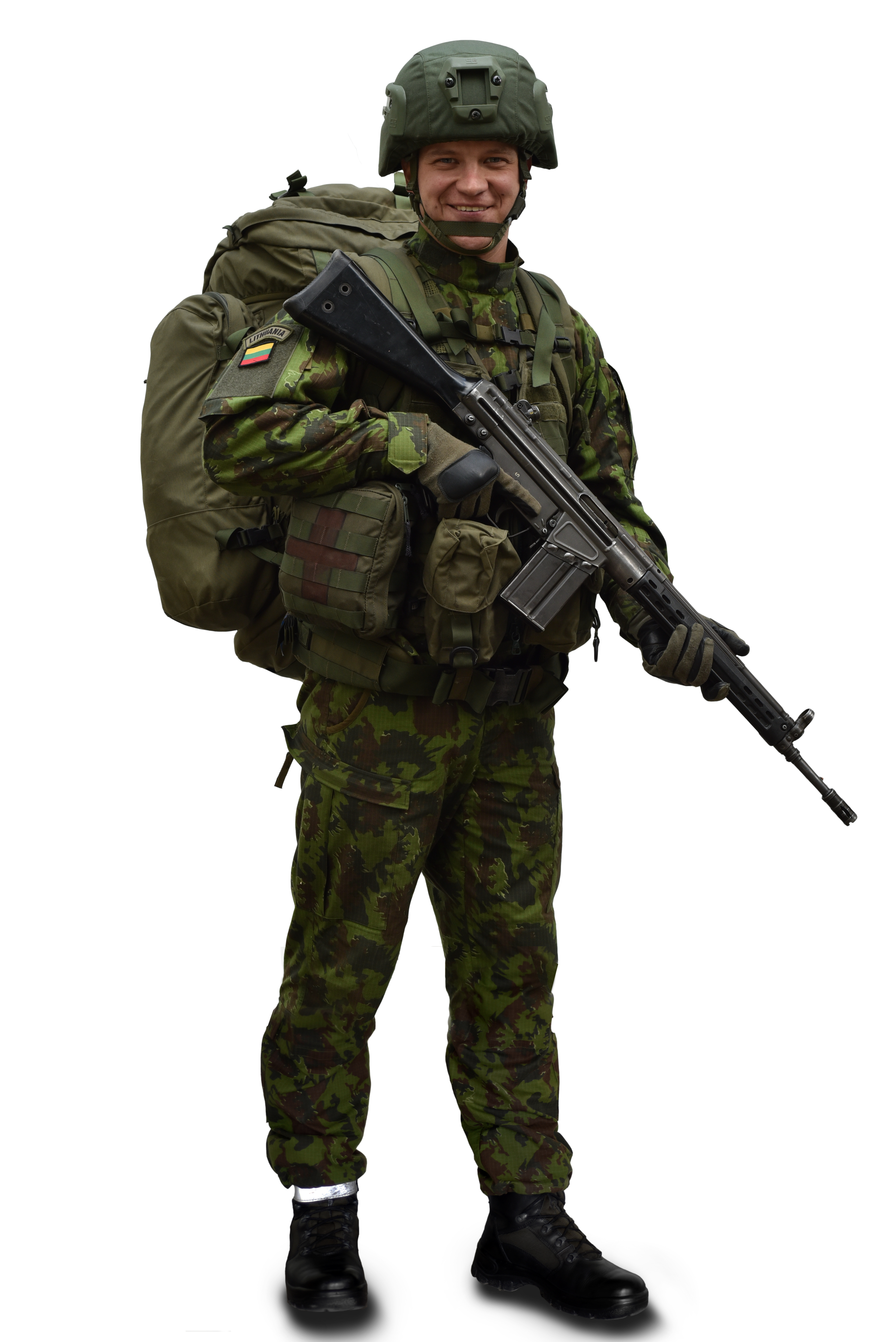 KASP karys savanoris su atakos ekipuote